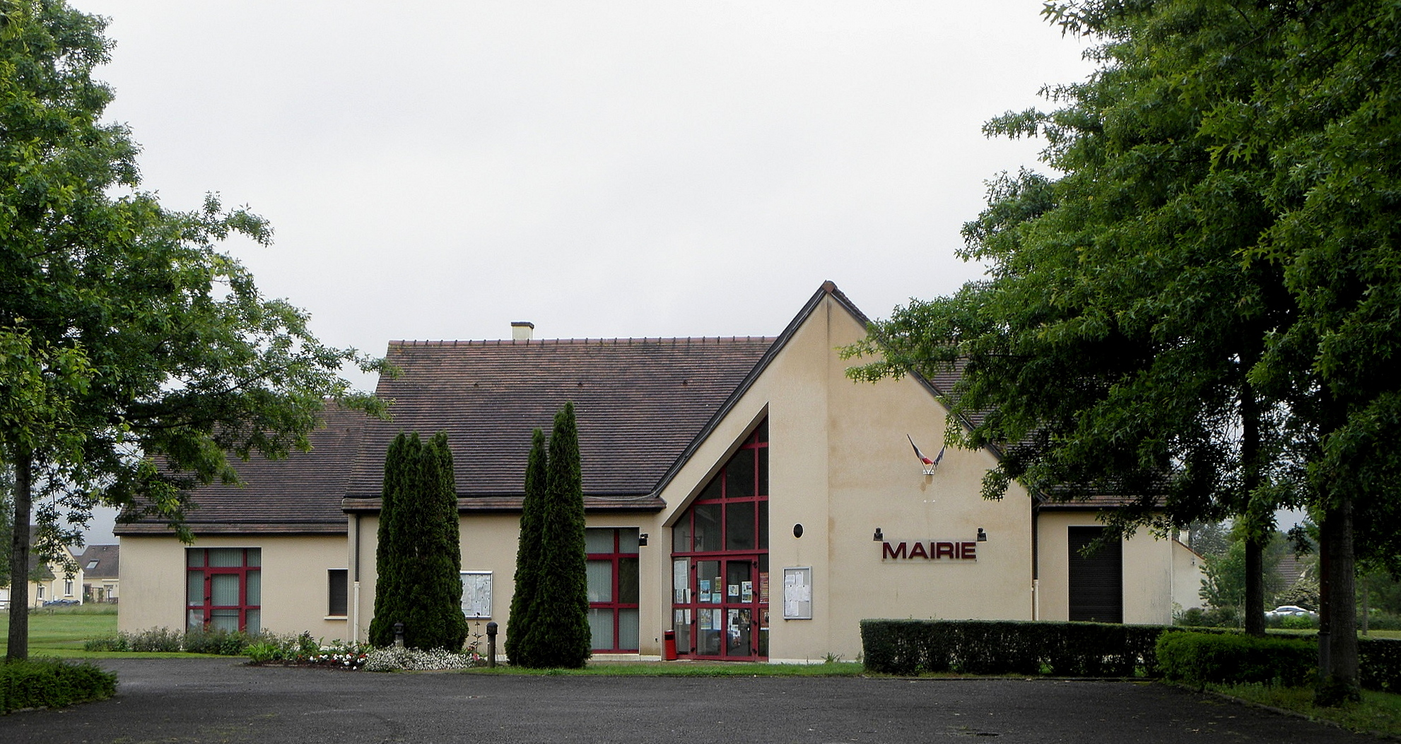 Mairie de Mieuxcé (61).